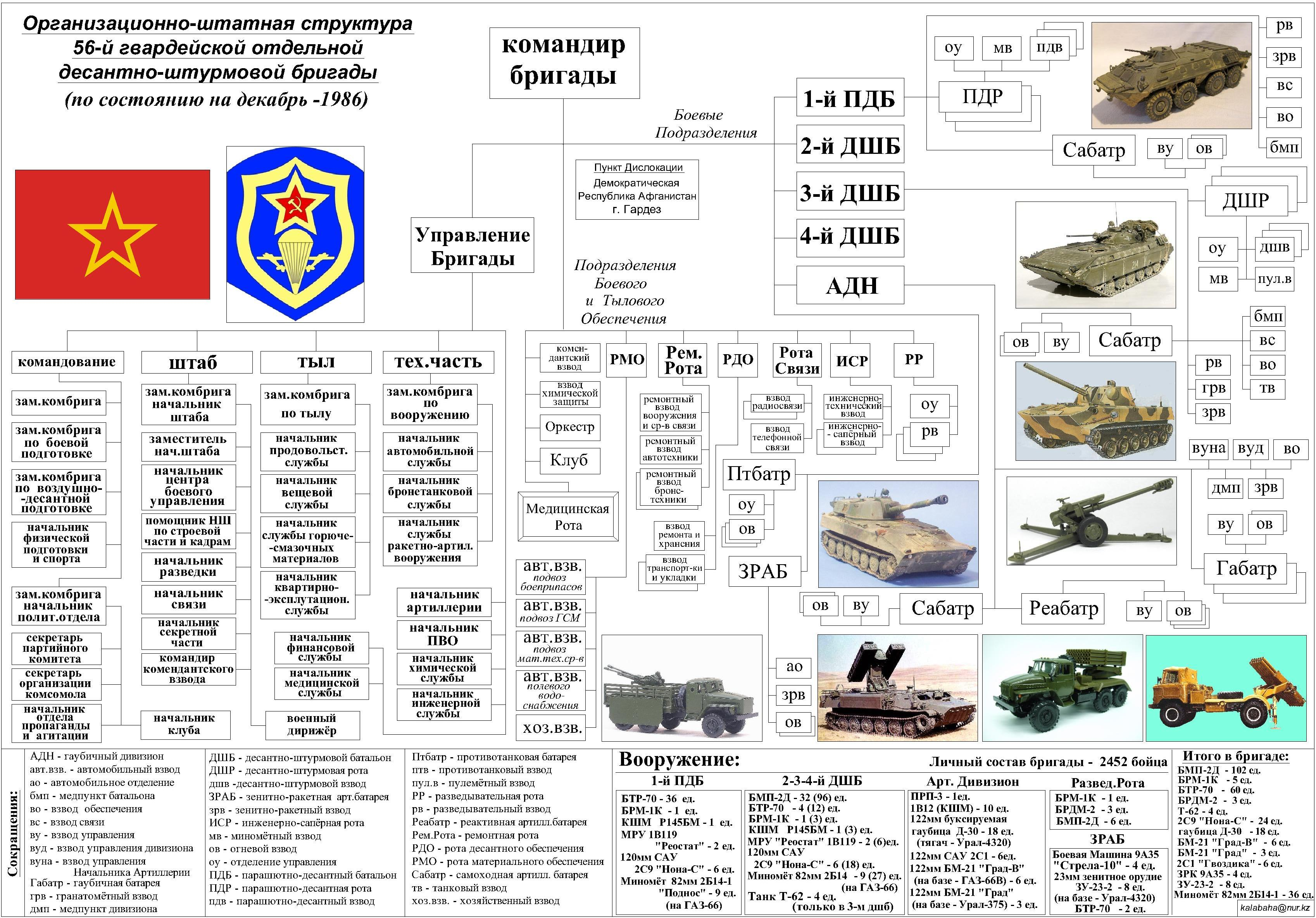 Организационно-штатная структура 56-й гвардейской отдельной десантно-штурмовой бригады на декабрь-1986. Собственная работа на основе данных, взятых с сайтов 56-го гв.одшбр и , а также данных, взятых у Бешкарева Александра Ивановича "Афганистан. 56 гв.одшбр" с сайта . Отчерчено в AutoCAD 2005 собственноручно.